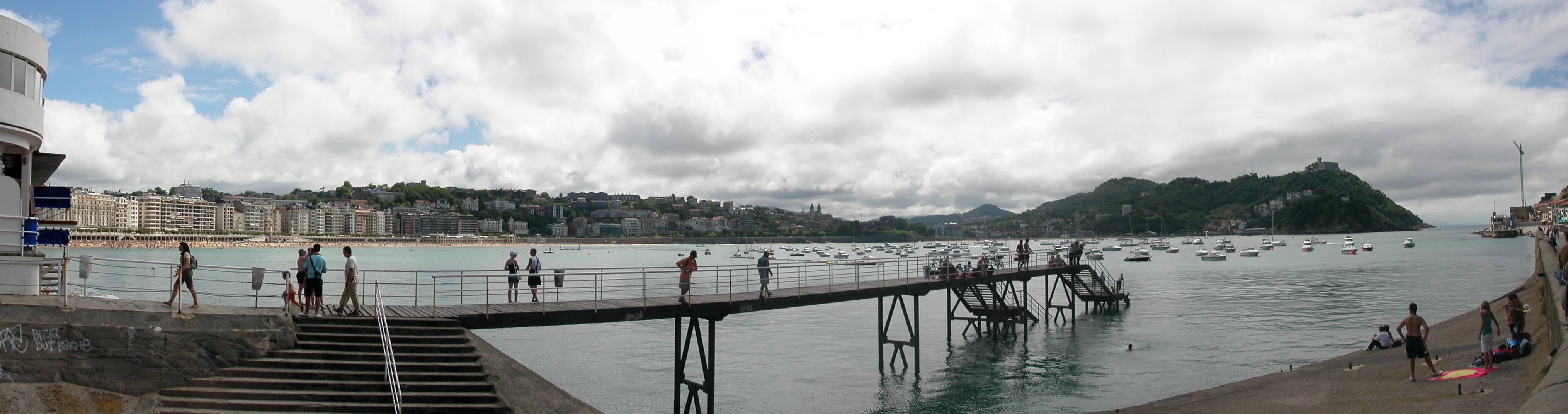 Baie de la Concha à Saint-Sébastien.